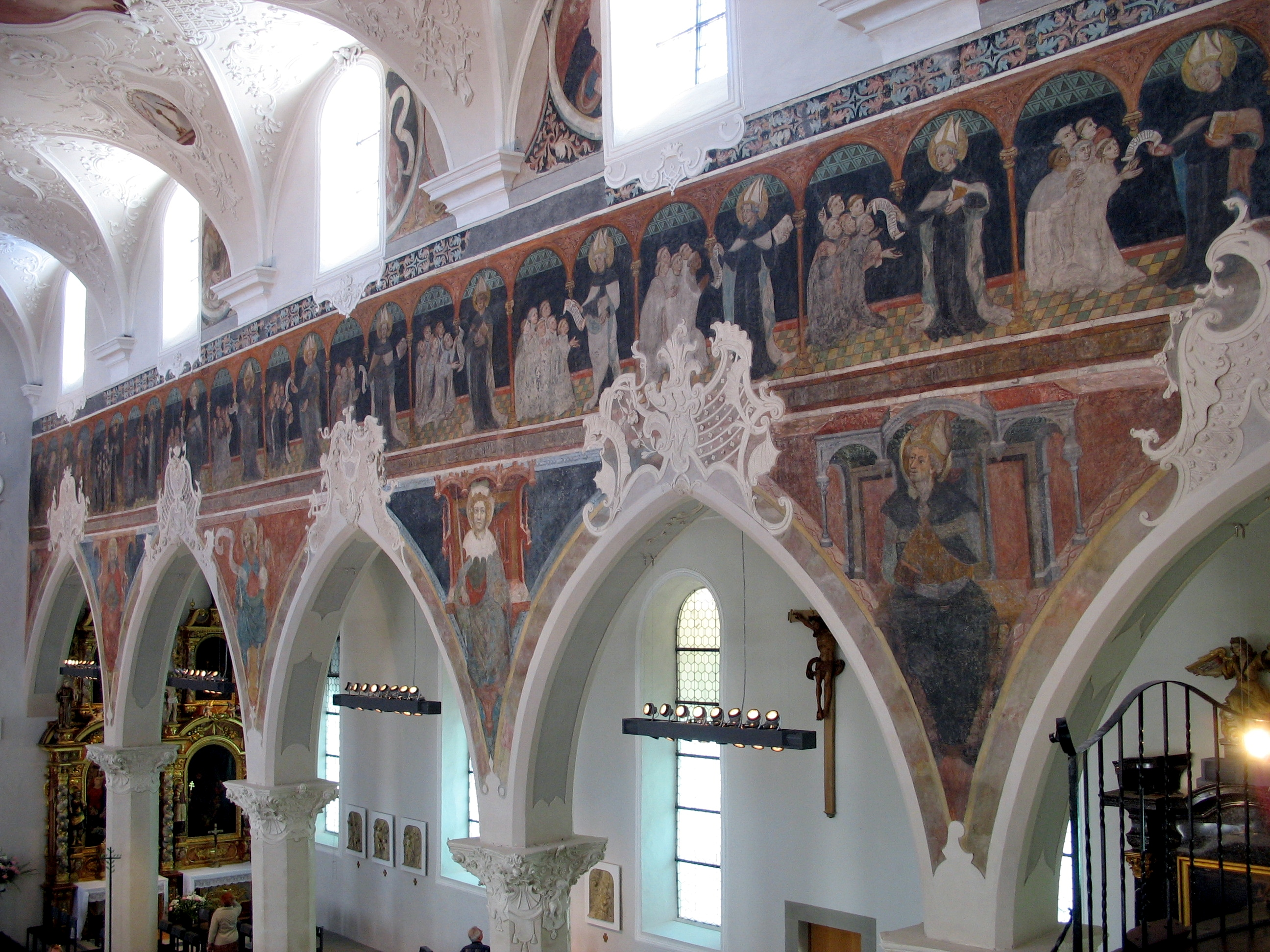 Konstanz, Dreifaltigkeitskirche, Südwand